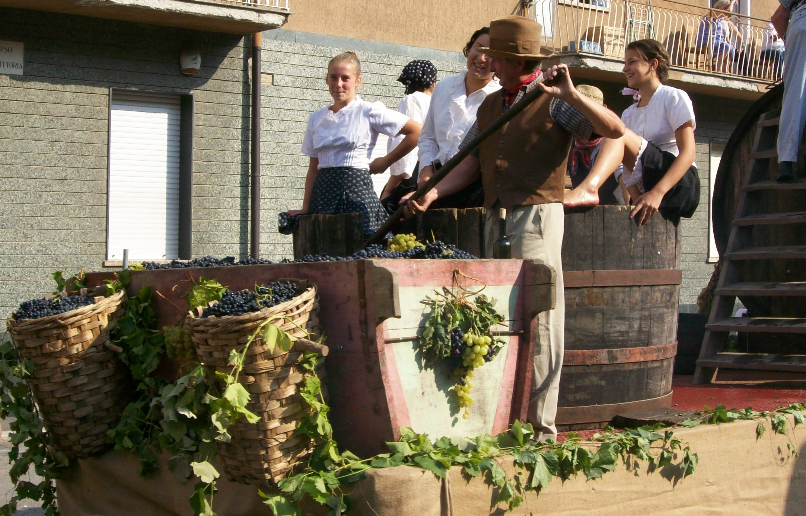 Rappresentazione della raccolta dell'uva